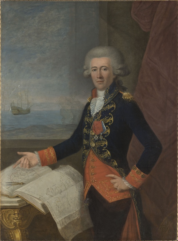 Portrait présumé de Gaston de Vauvineux